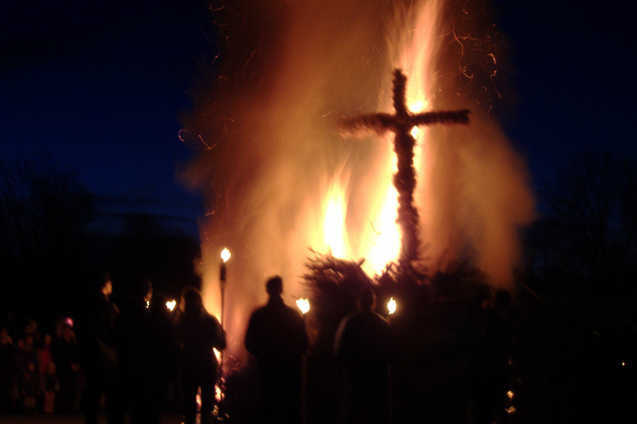 Osterfeuer Olching 2008